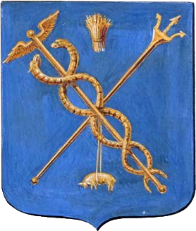 Герб Феодосии, утверждённый 11 мая 1811